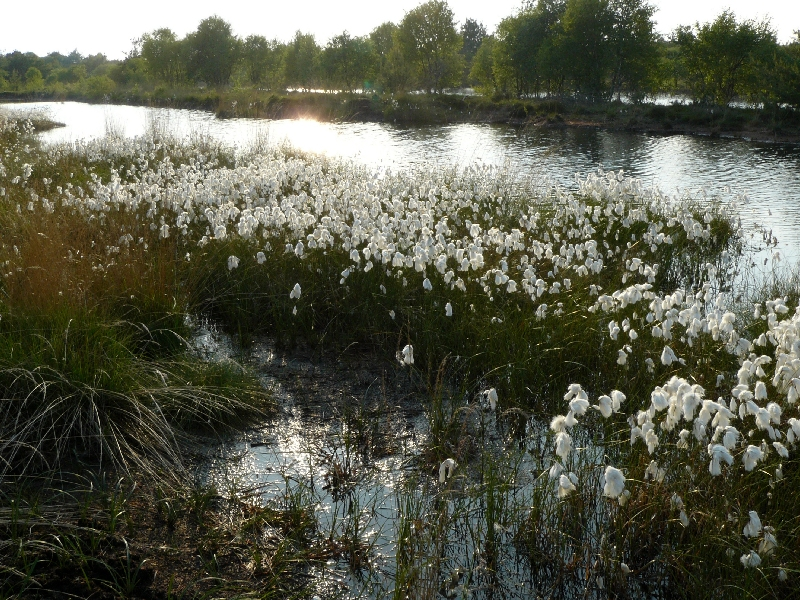 Wollgras (fruchtend) im Hohen Moor (Stade)